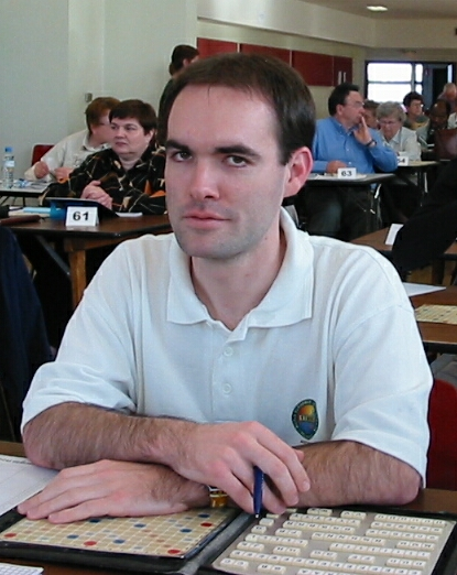 Antonin Michel Photographie personnelle, prise Ã Golbey le 23.03.2003 Ã l'occasion du championnat de Lorraine de Scrabble